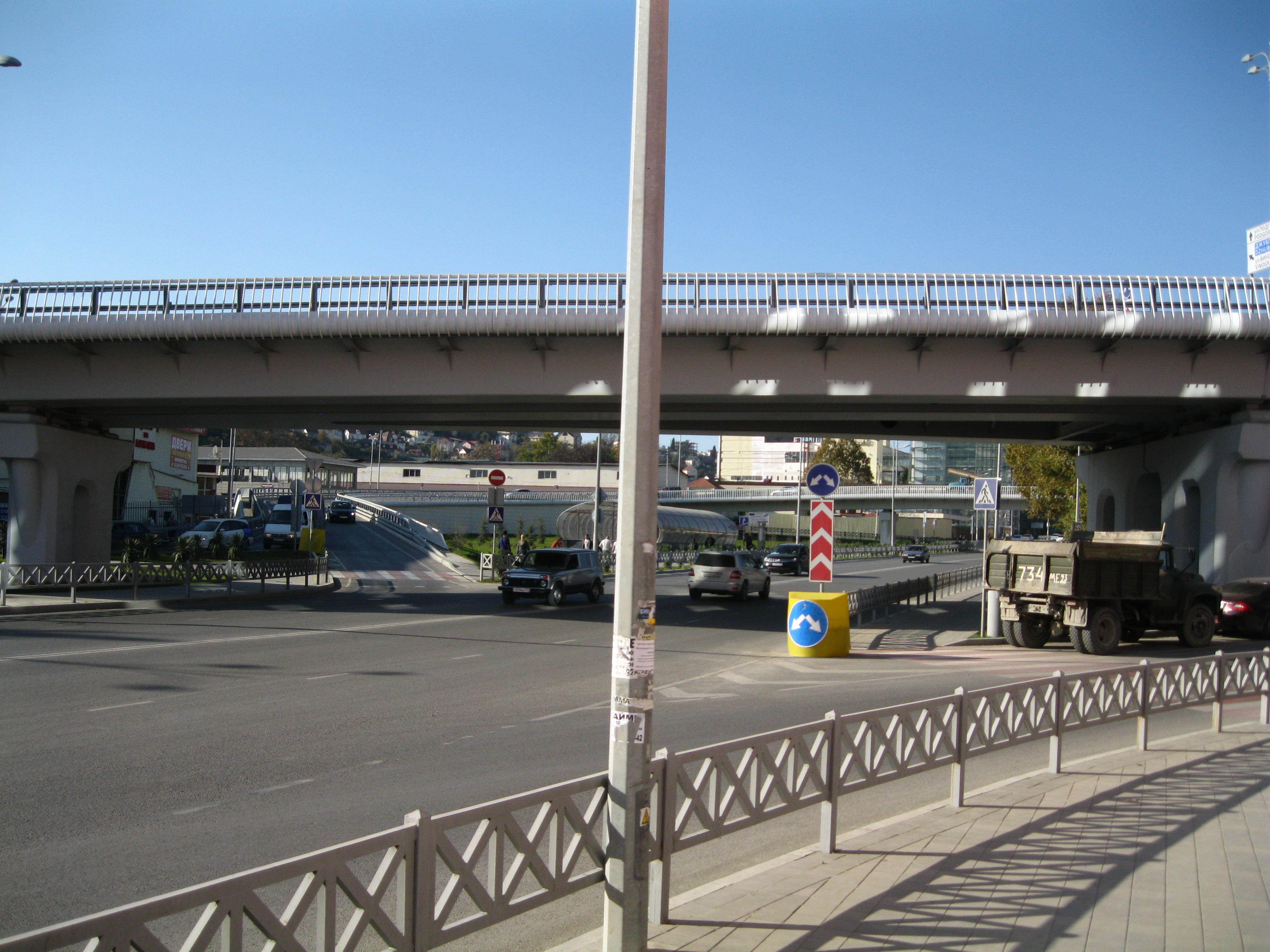 Транспортная развязка улиц Донская и Гагарина в Сочи, Россия